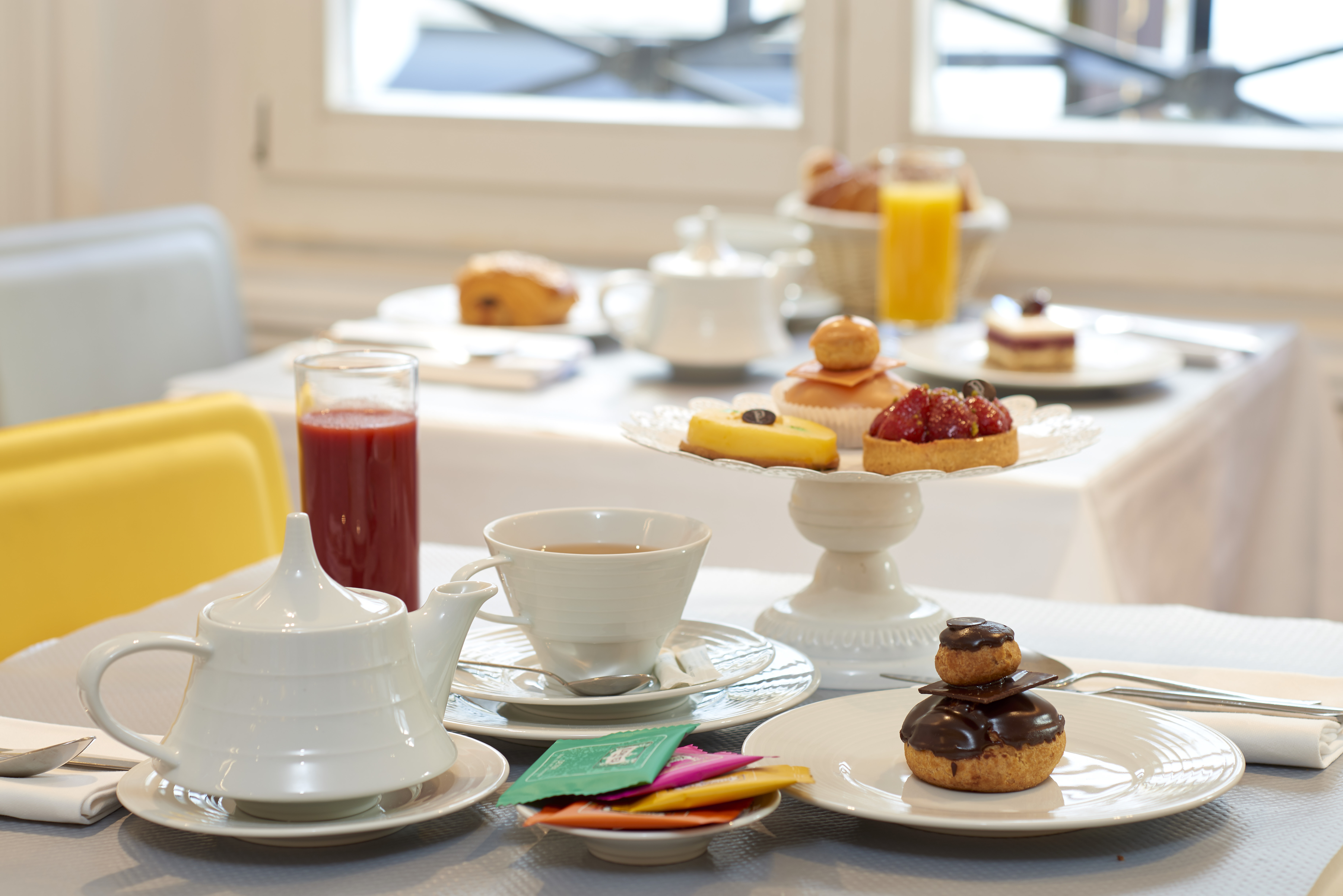 L’après midi les restaurants Maison Pradier deviennent des salons de thé